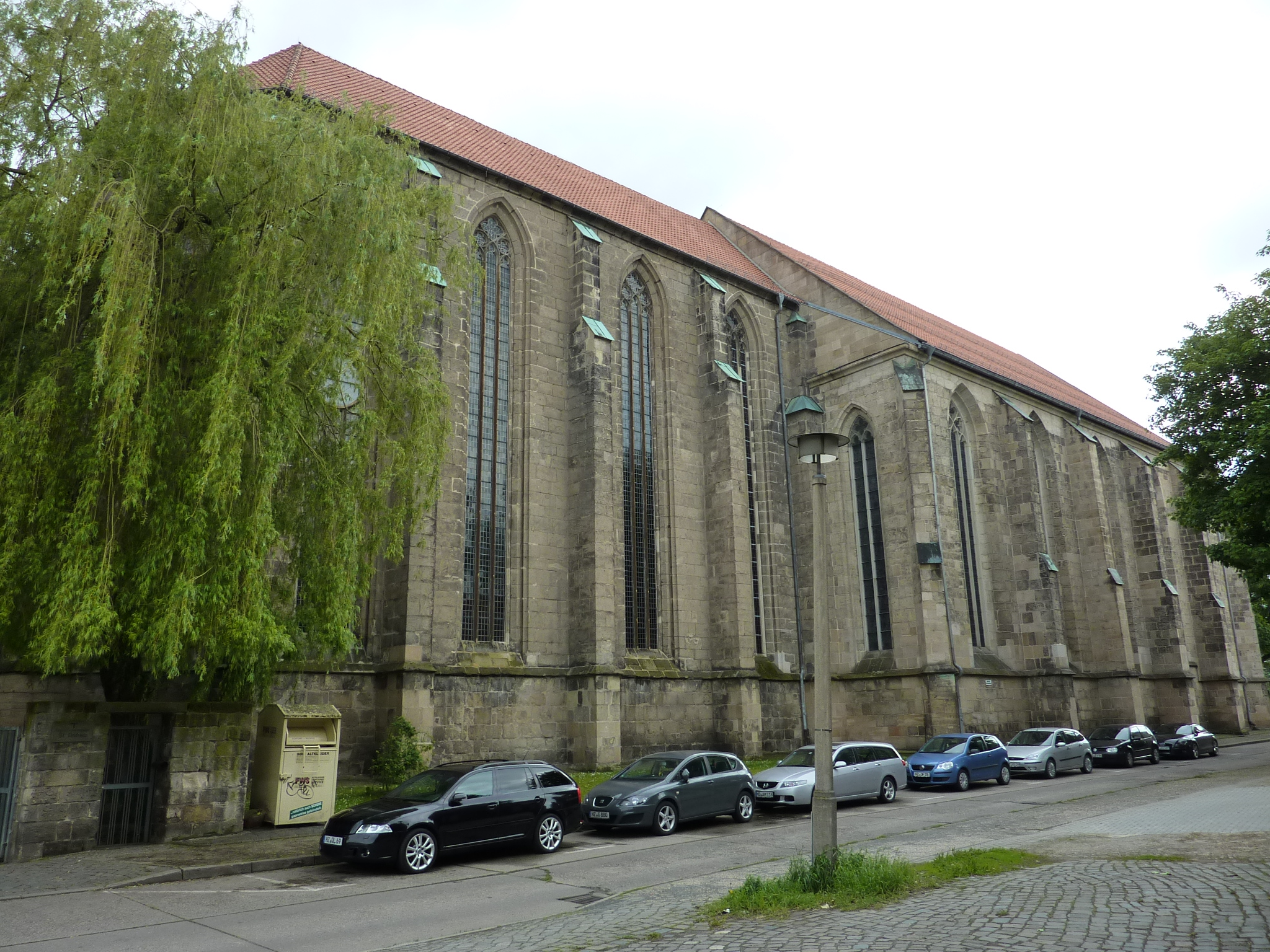 St Andreas (Halberstadt)